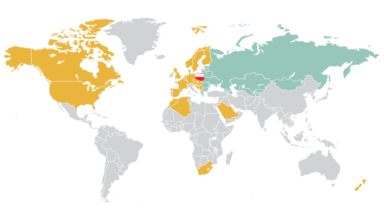 Ceramika Paradyż - eksport